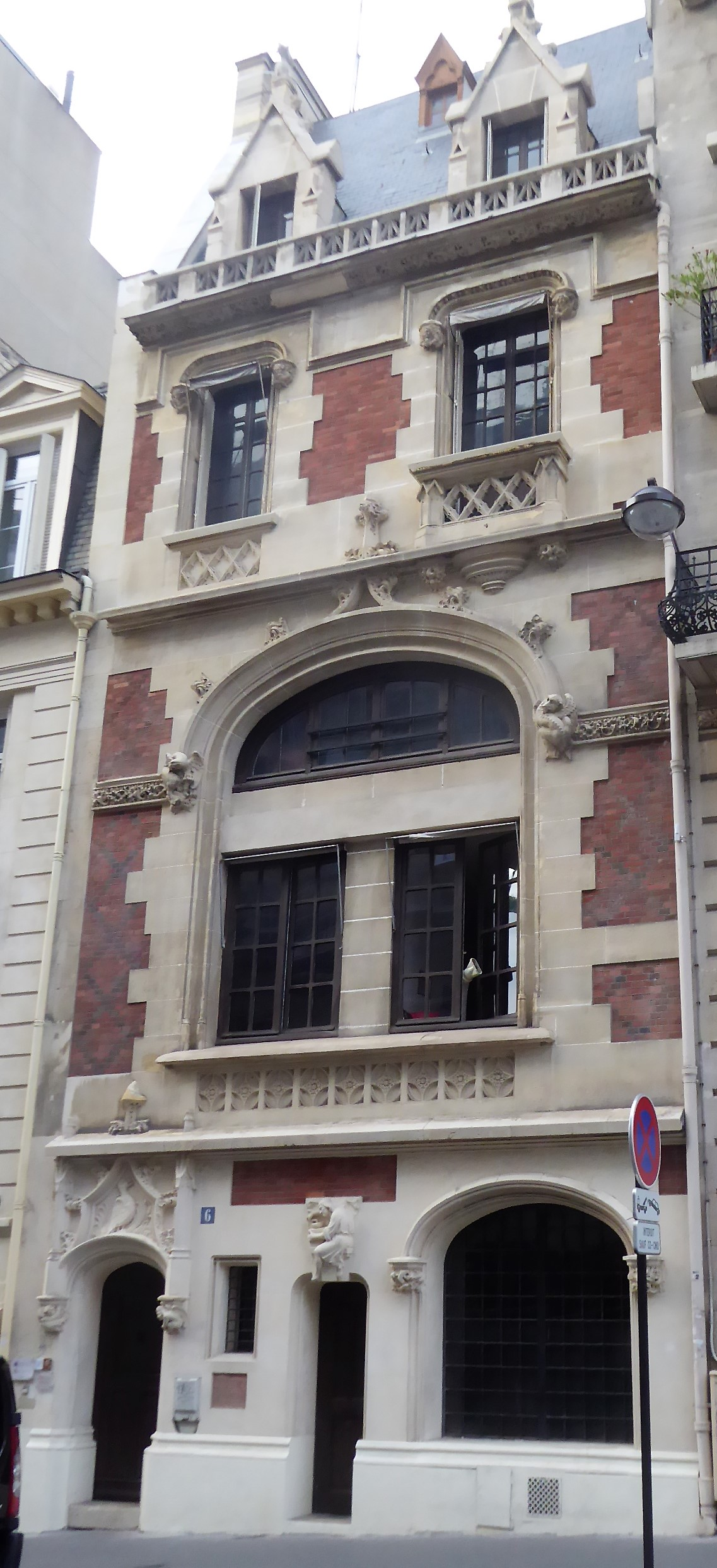 Rue André Roll 6